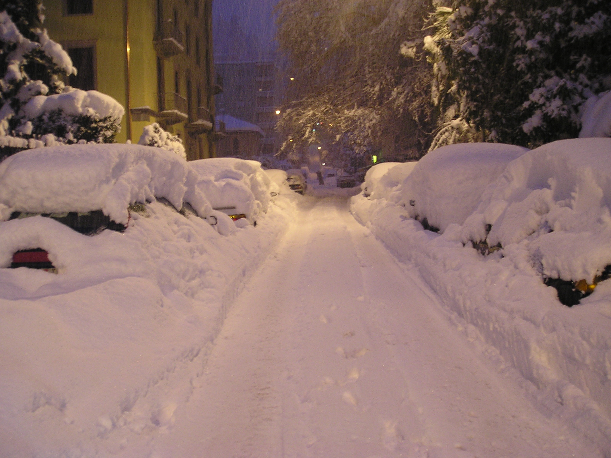 Lugano: automobili sepolte dalla nevicata eccezionale di venerdî 27 gennaio 2006; autore Massimo Macconi